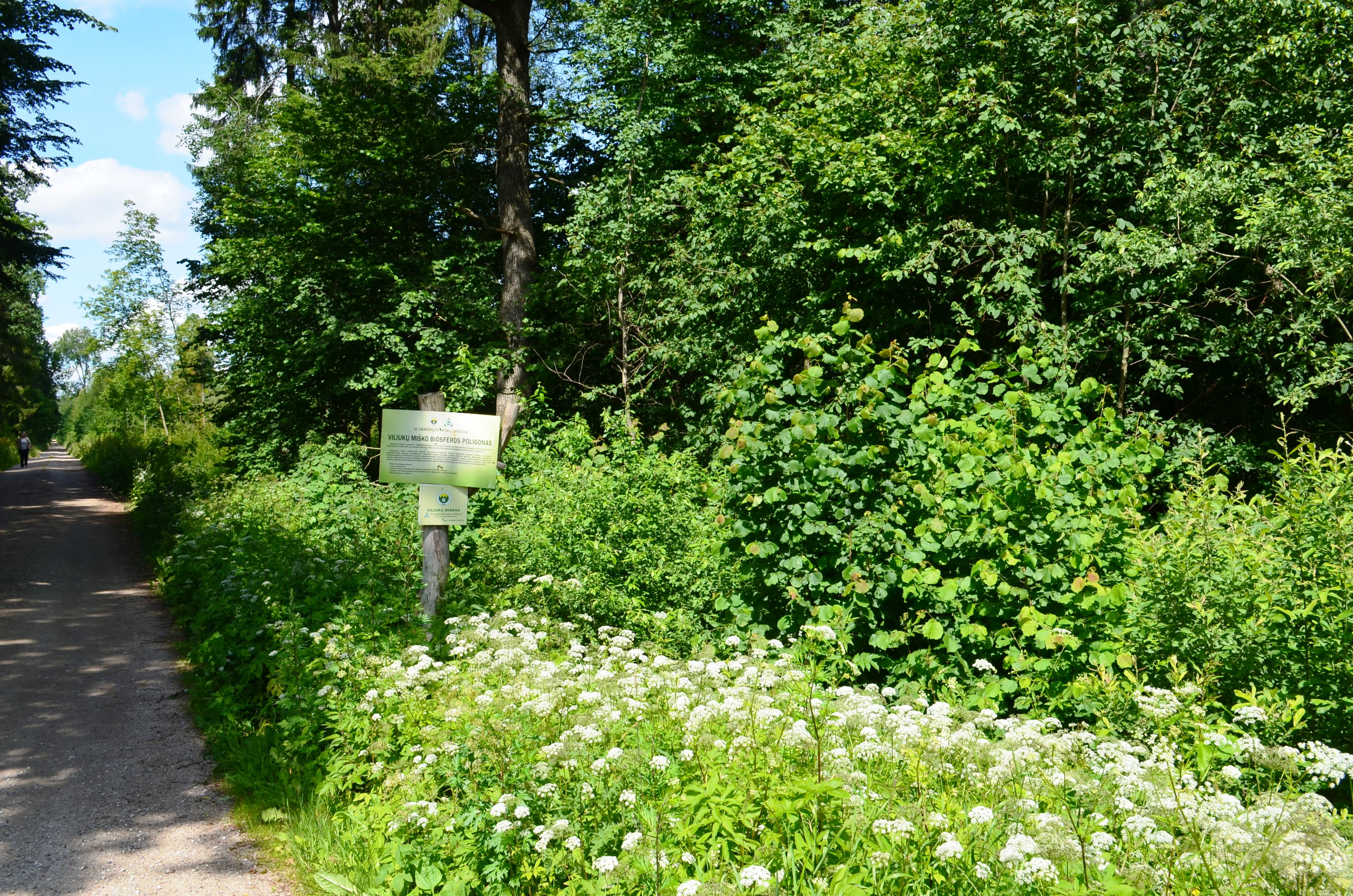 Viliukų miškas ties Viliukais, Ukmergės r.